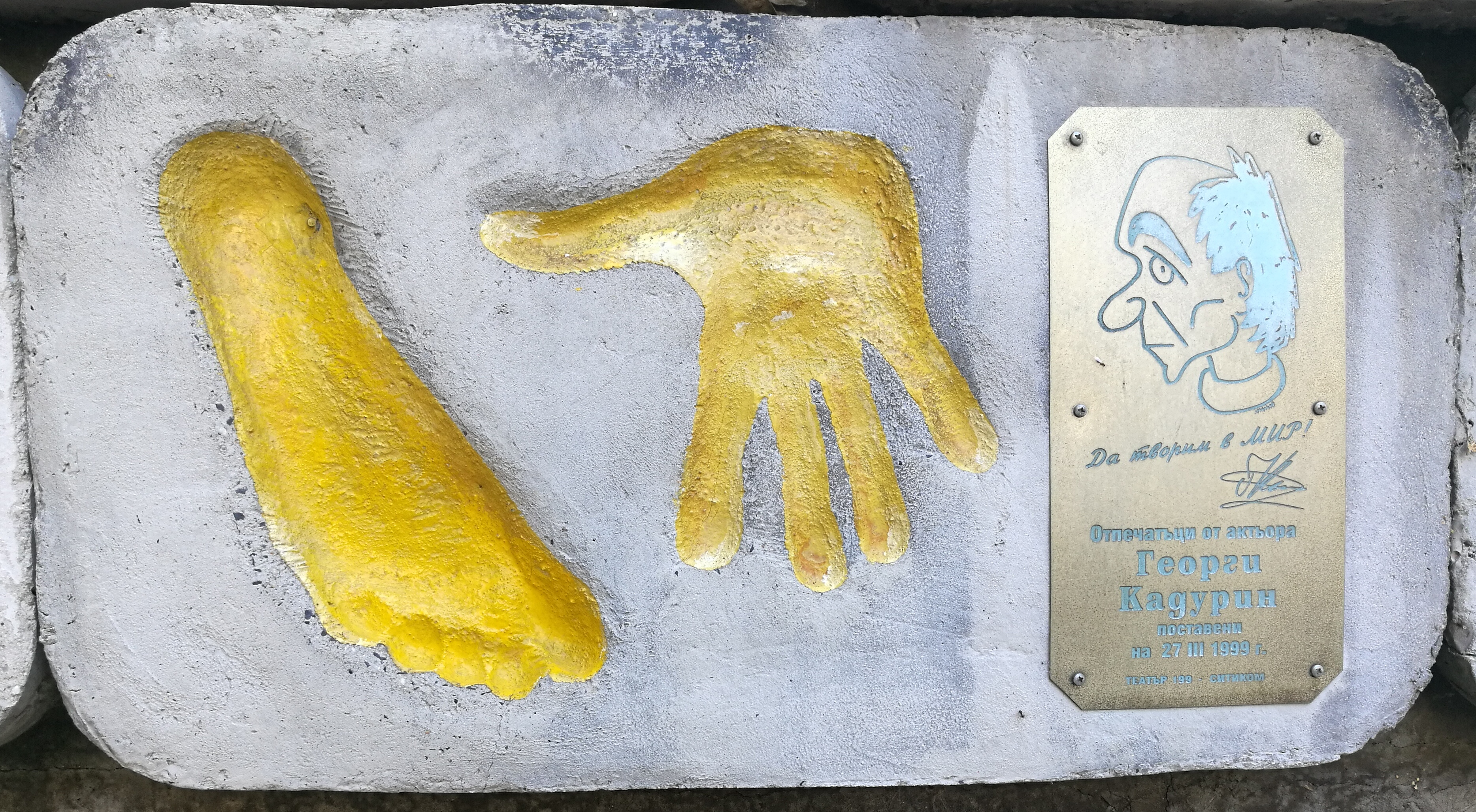 Стената на славата пред Театър 199 - пано с отпечатъци, послание и шарж на Георги Кадурин.